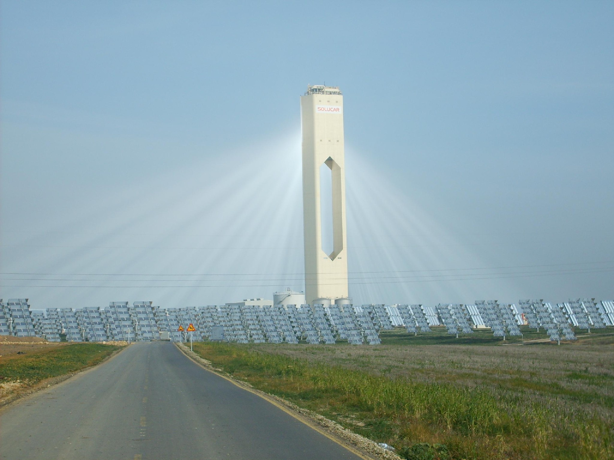 Rayos reflejados en lo alto de la torre de PS10 en pleno funcionamiento de la planta.